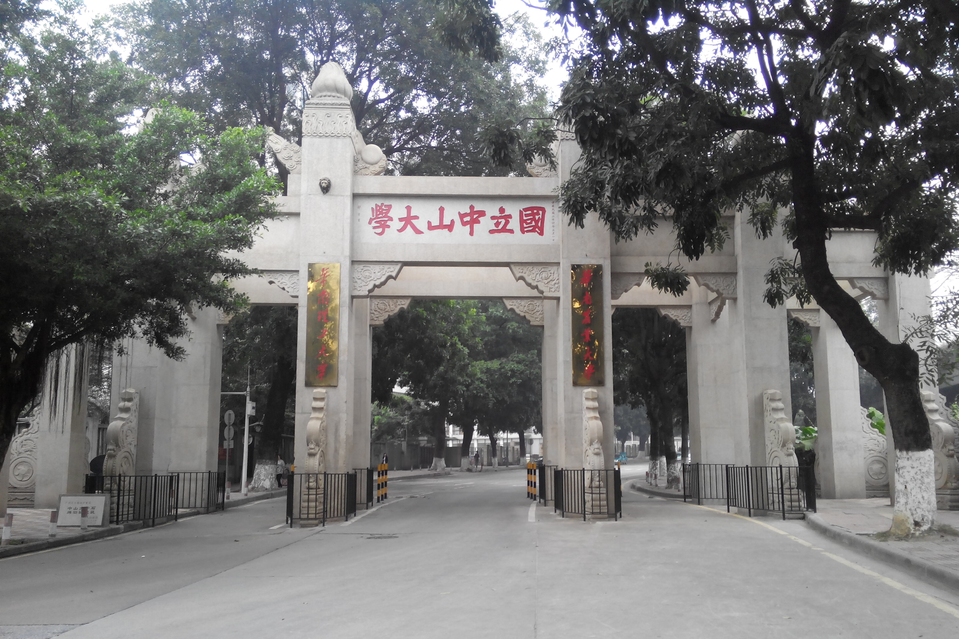 中文（中国大陆）: 国立中山大学